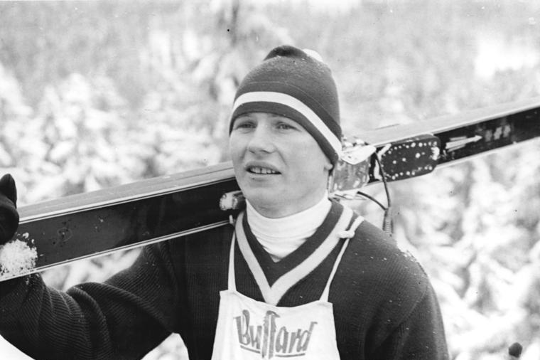 Zentralbild Gahlbeck-3.1.70 Johanngeorgenstadt: Beim Springen des zweiten Wettbewerbs in der nordischen Kombination um den "Pokal der Olympiaausstatterbetriebe" auf der Erzgebirgschanze in Johanngeorgenstadt erreichte Lothar Düring (Dynamo Johanngeorgenstadt-Archivfoto) nach Sprüngen von 68,5 und 68m Bestnote 208,5. Allerdings mußte er sich den ersten Platz mit seinem Klubkameraden Lothar Marle teilen, der ebenfalls 208,5 Punkte erreichte.